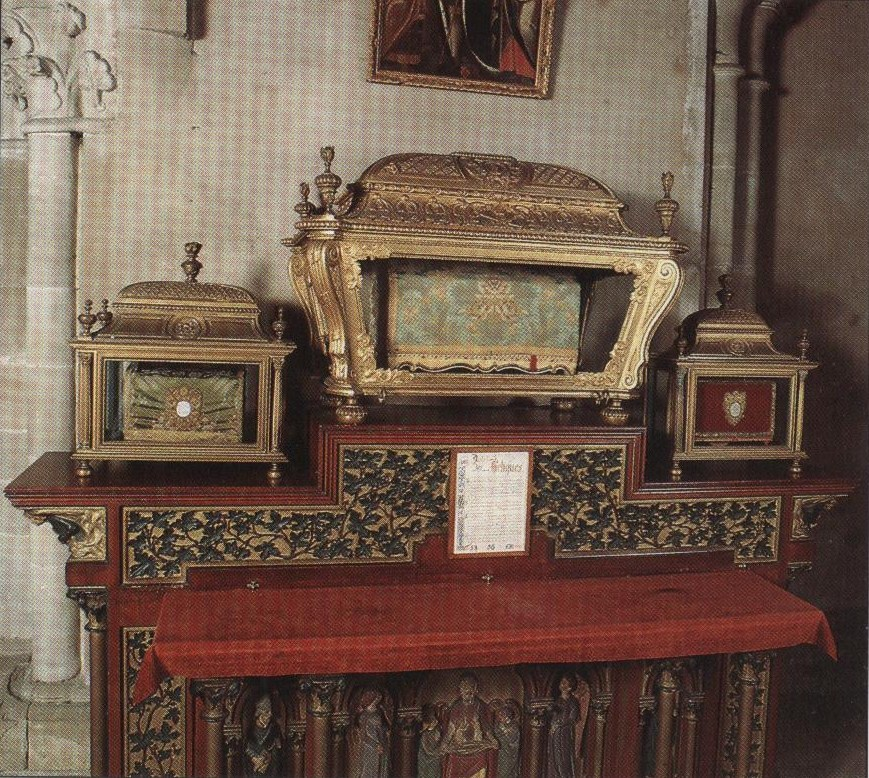 trois chases des trois saints Goéry, Maurice et Auger